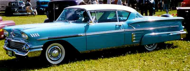 1958 Chevrolet Bel Air Impala, Model 1747 2-door Hardtop